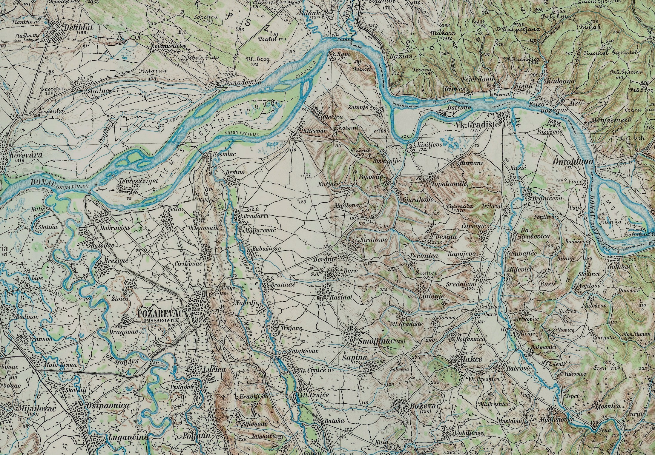 Mündungsgebiete der Flüsse Morava, Mlava und Pek in Nordostserbien